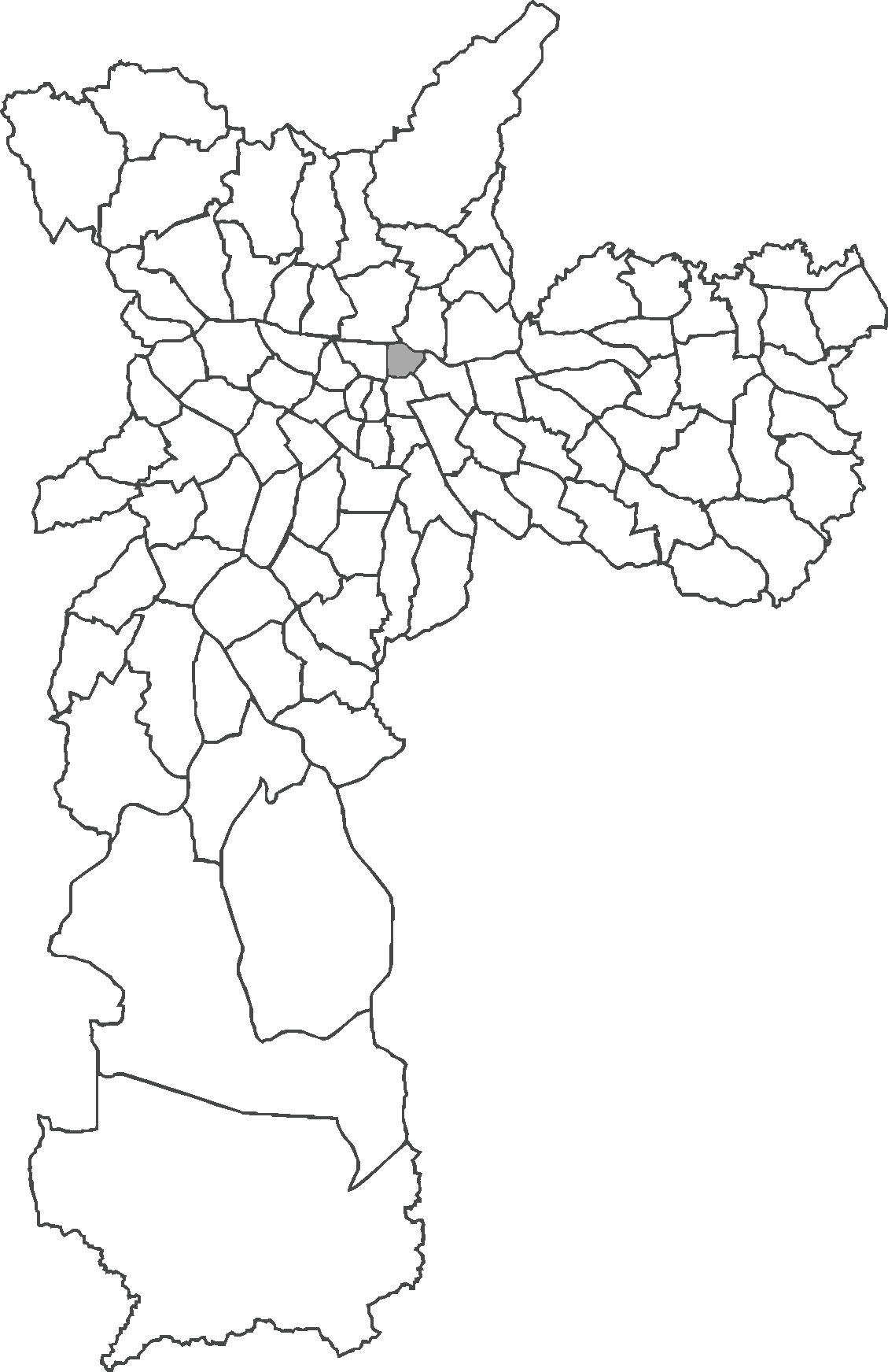 Localização do distrito de Pari no município de São Paulo.